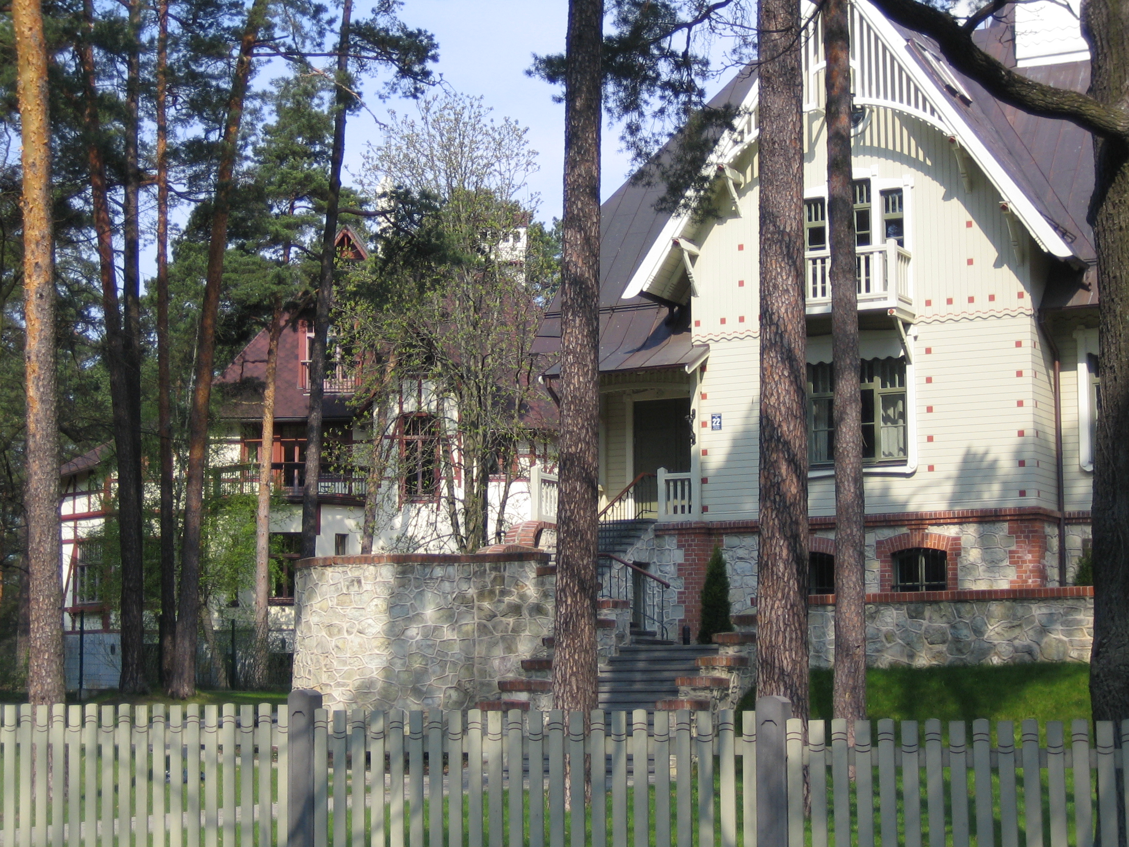 Характерная застройка начала 20-го века в Межапарке.